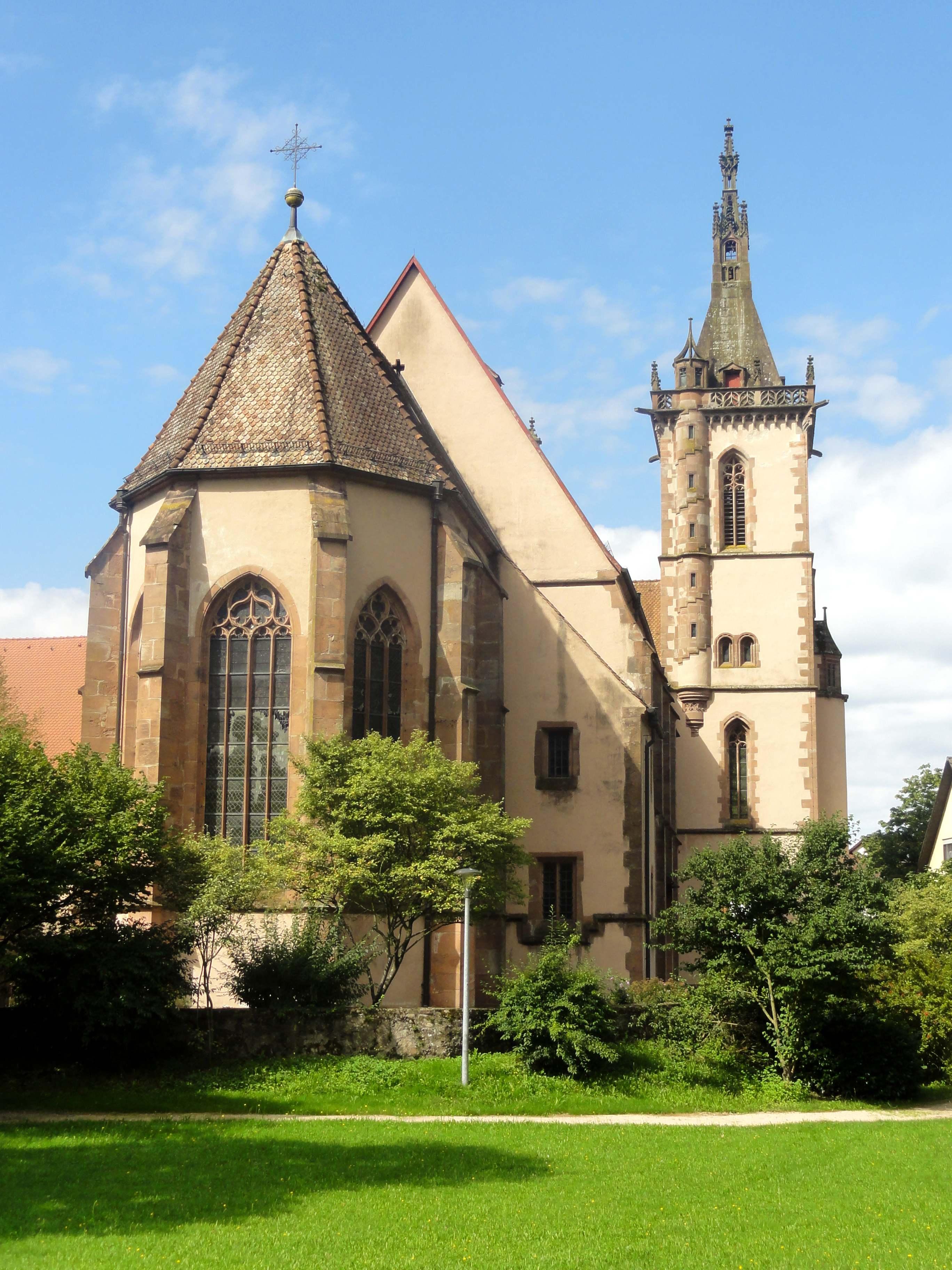 Wallfahrtskirche Lautenbach - siehe Dateiname.